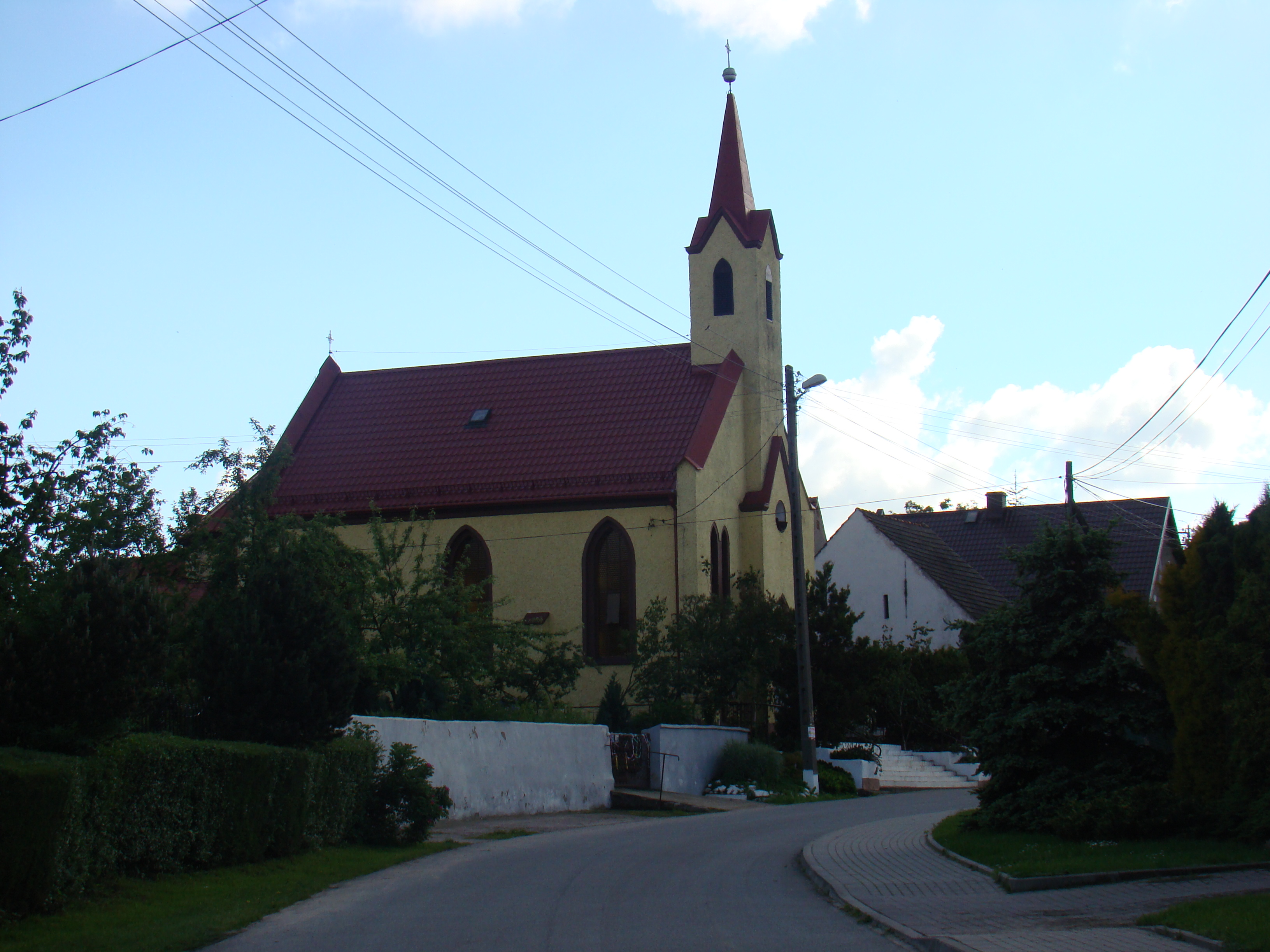 Maciejowice - kościół parafialny pw. Świętej Anny z 1882 roku